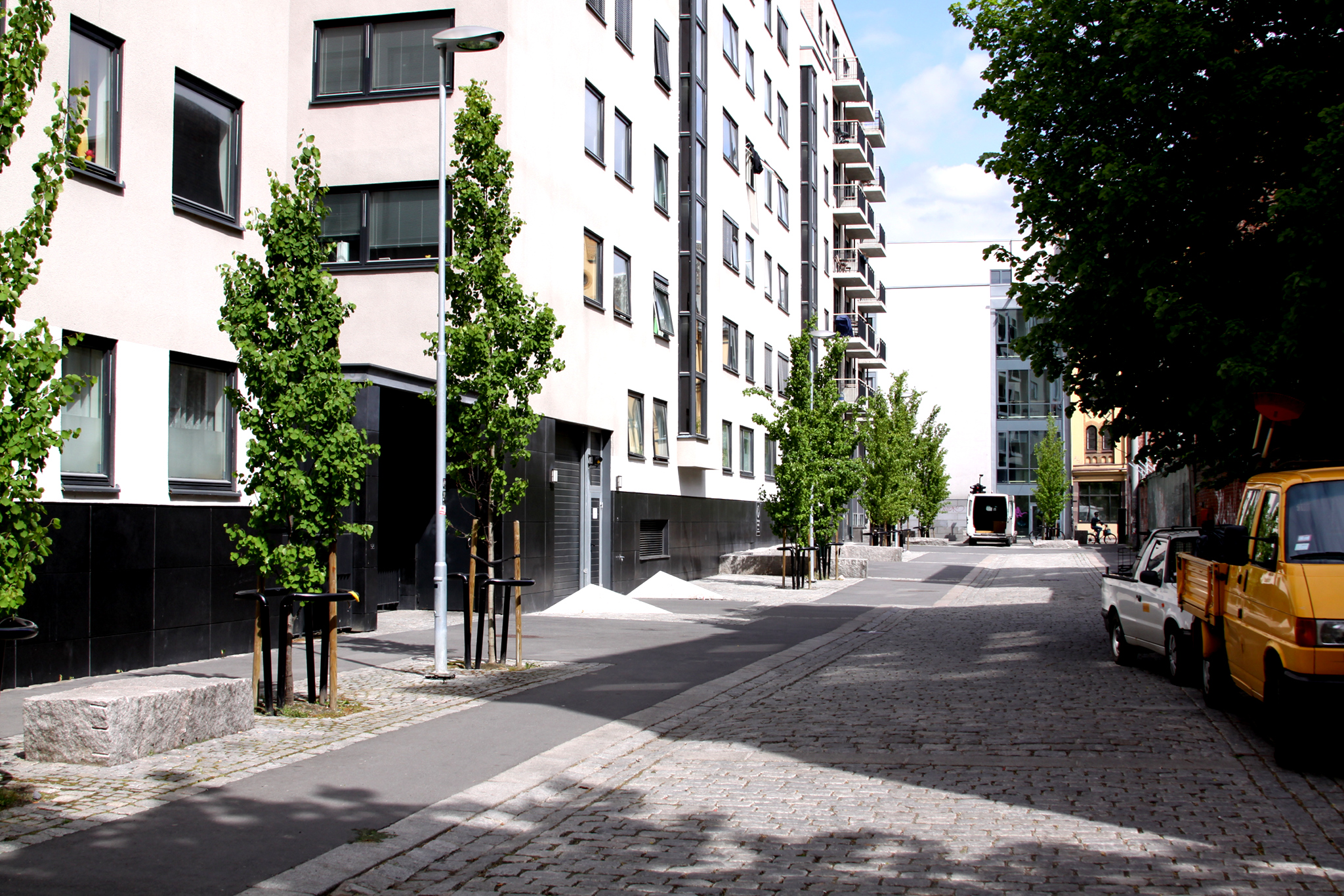 Jess Carlsens gate